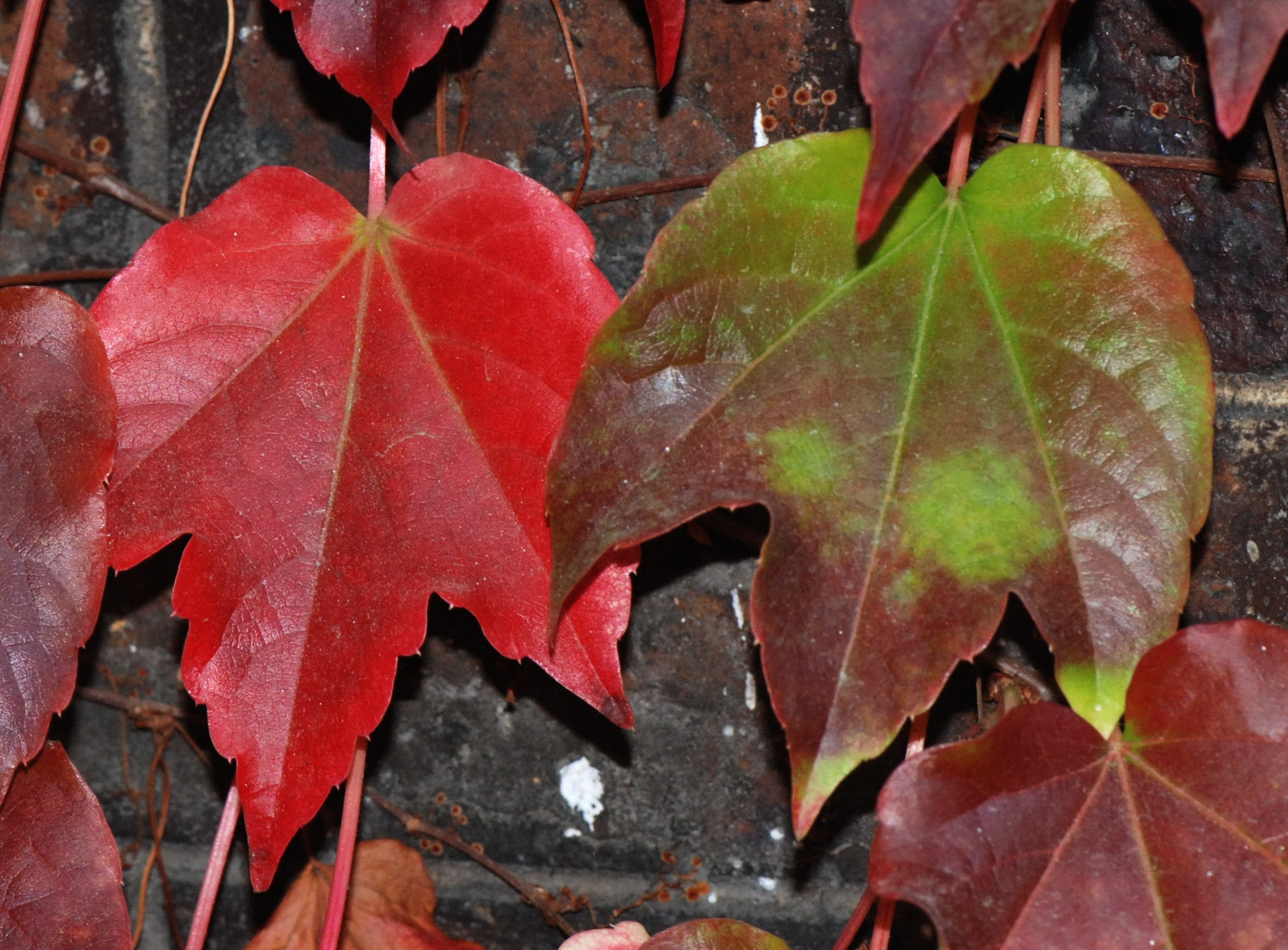 Parthenocissus tricuspidata, feuilles à l'automne, Paris.